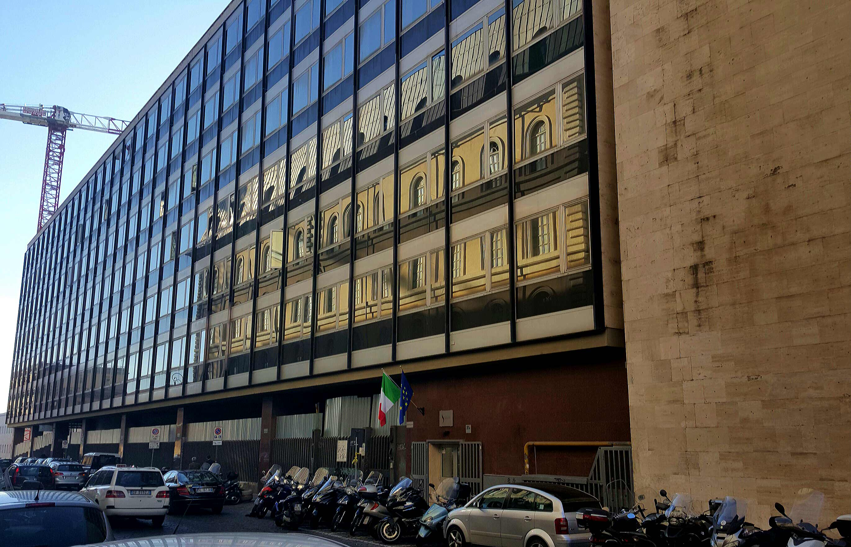 Sede centrale SOGIN a Roma